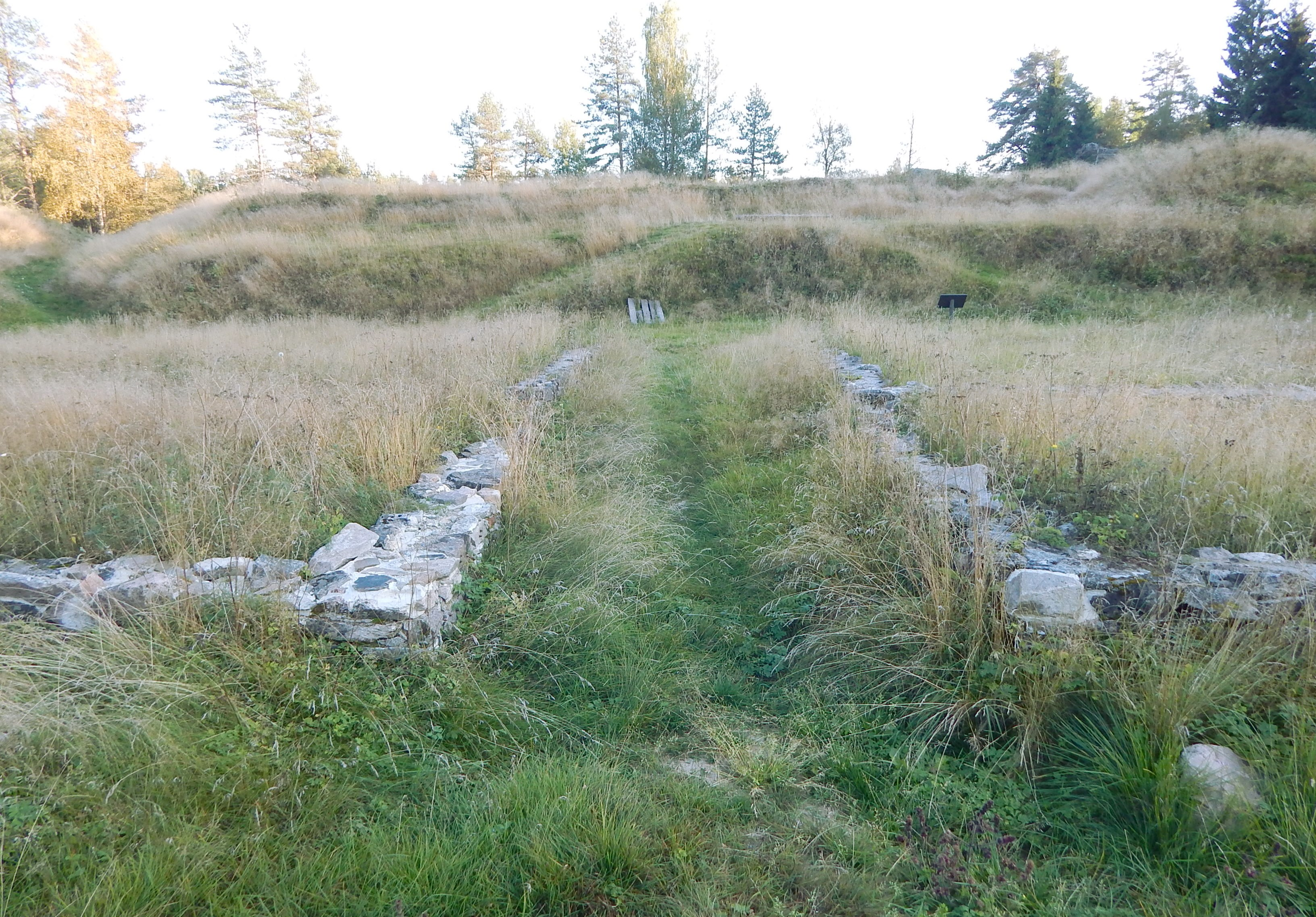 Terningen skanse